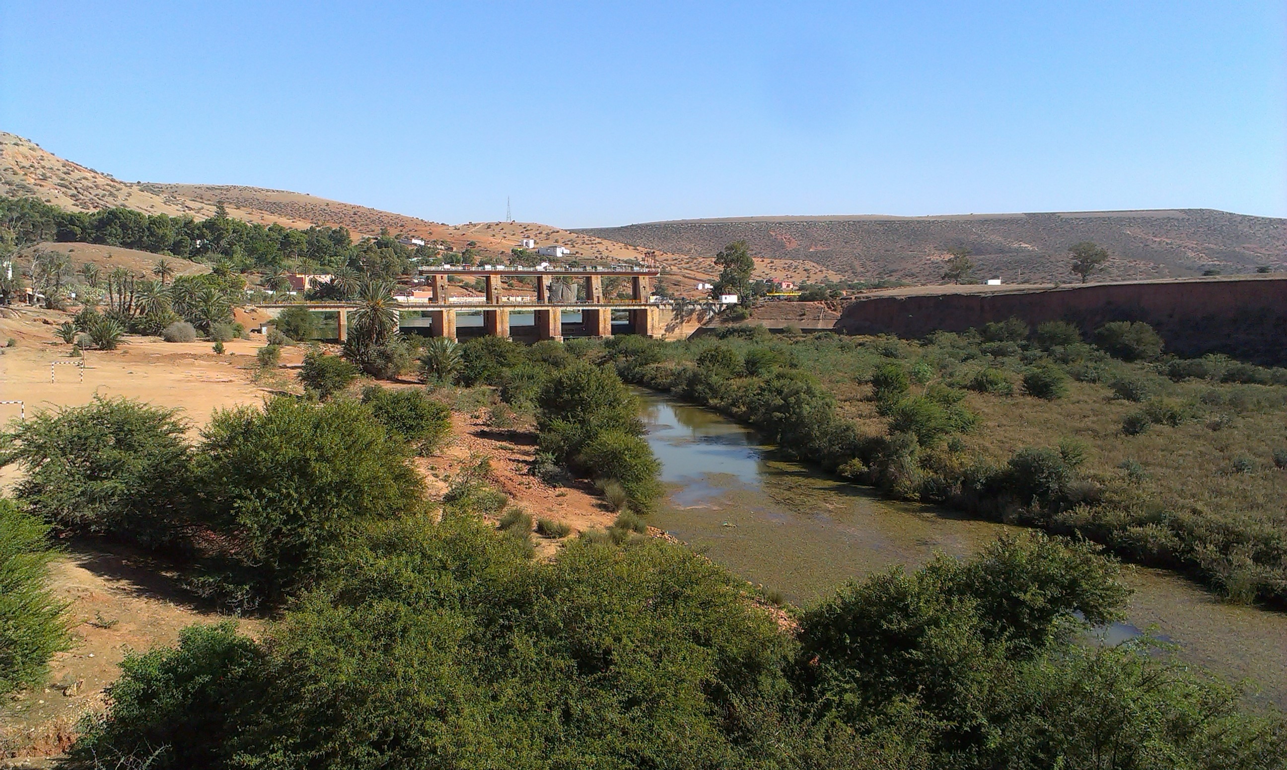 Staudamm (Barrage) Sidi Said Maachou im Marokko vom 14.Nov. 2017